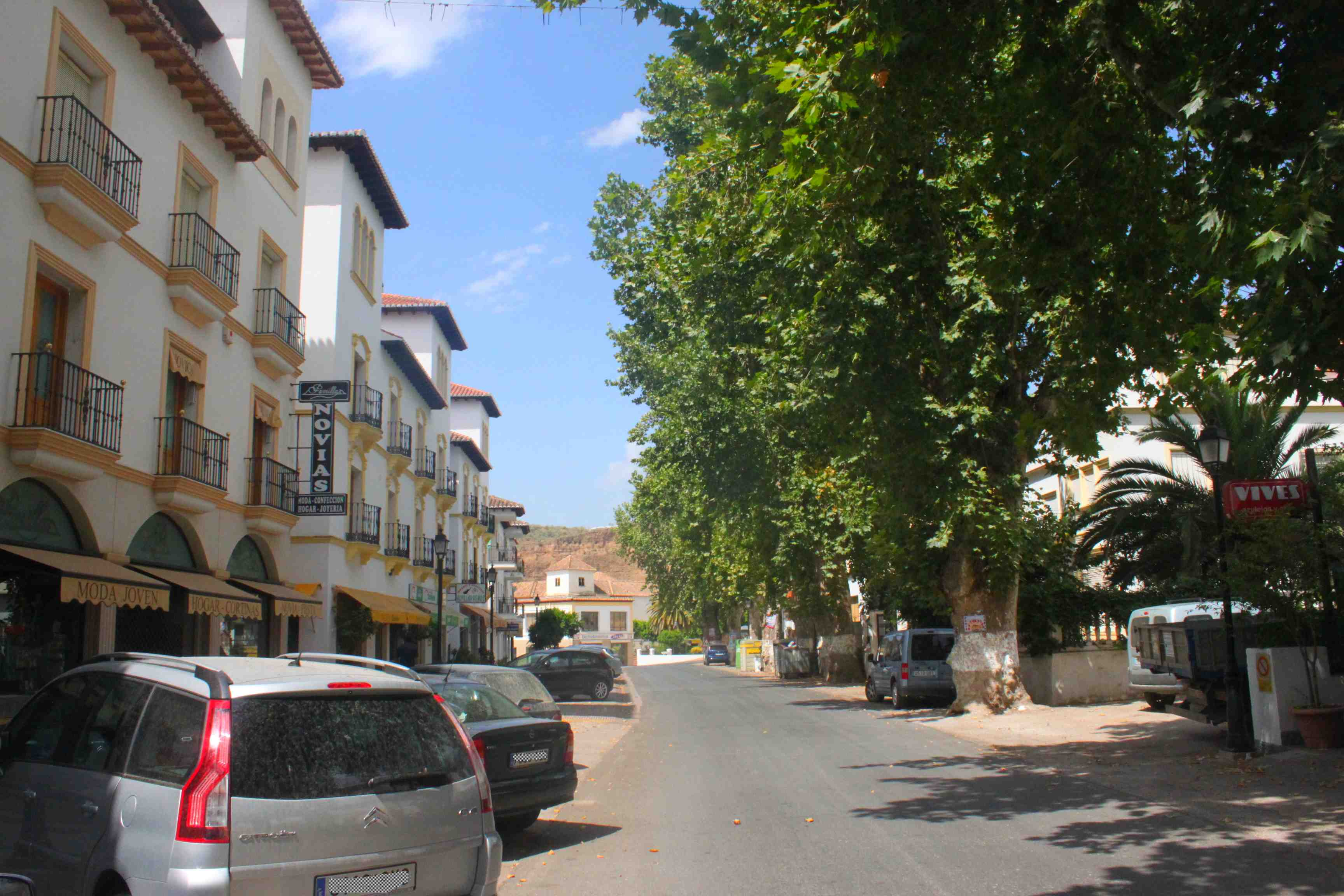 Die Hauptstraße von Ugíjar